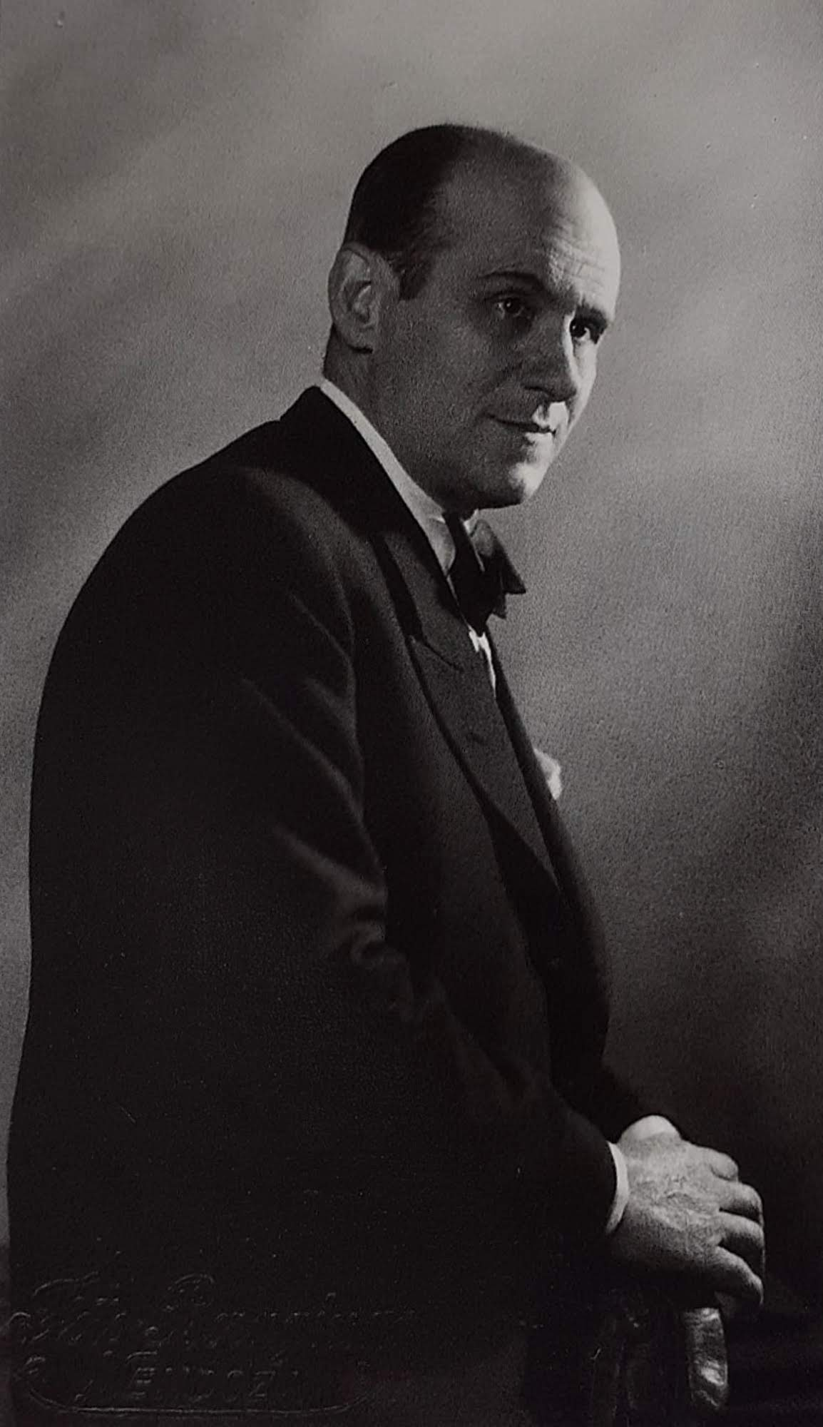 Artista Fidel Roig Matóns hacia la década de 1930